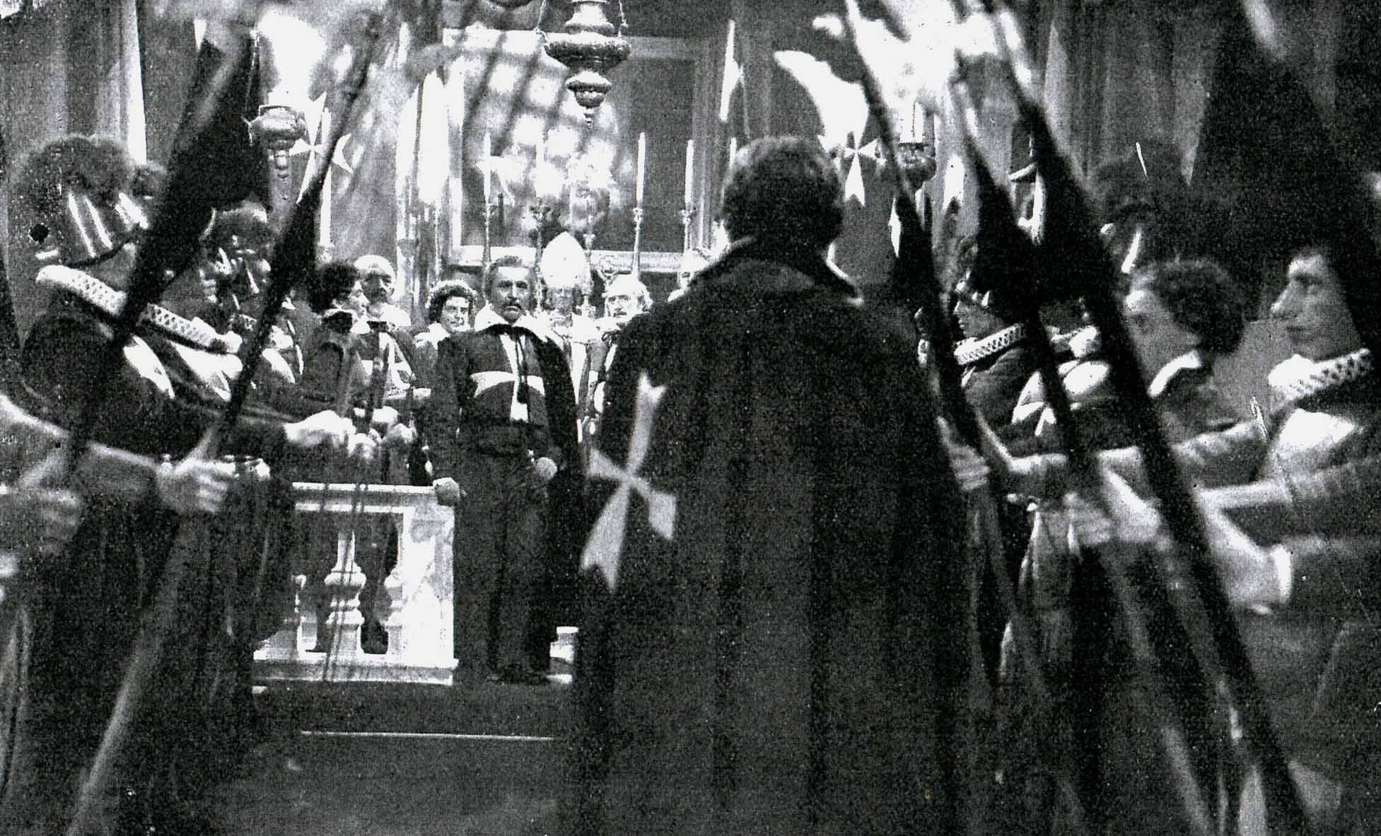 Scena del film "Caravaggio, il pittore maledetto" (Alessandrini, 1941)